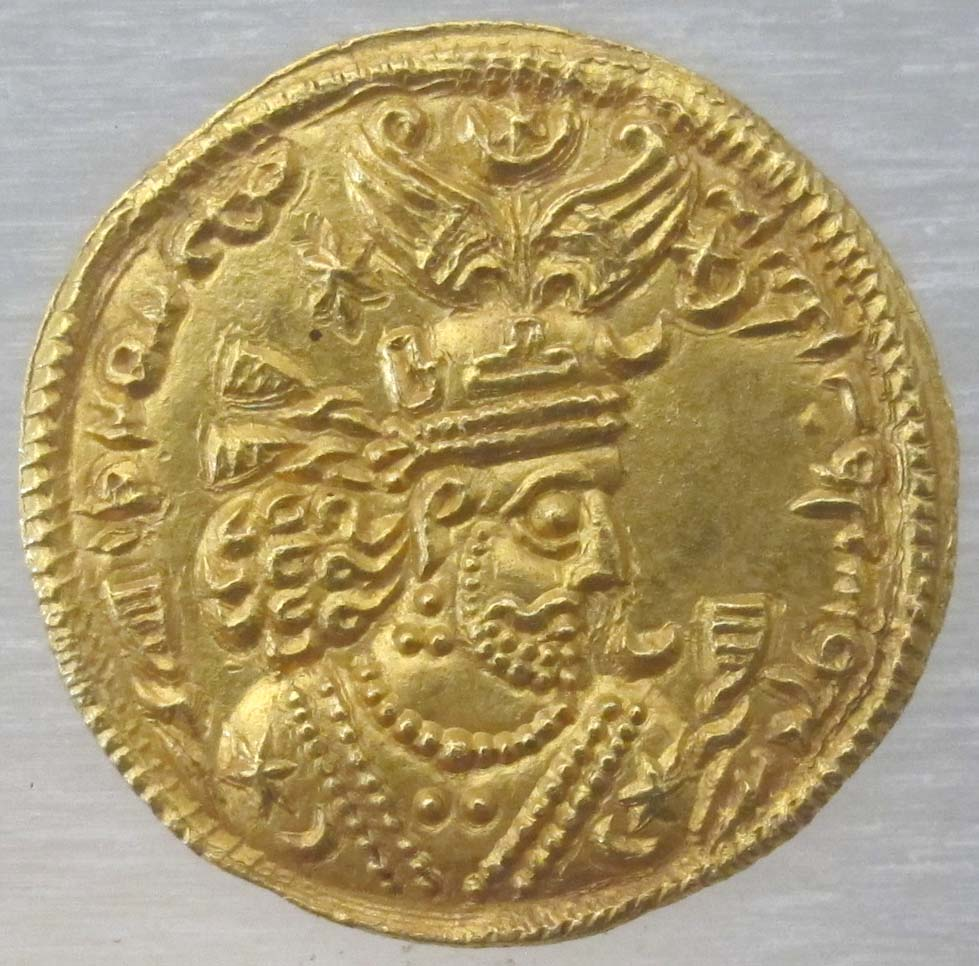 Iran, cosroè II, dinaro, 590-628